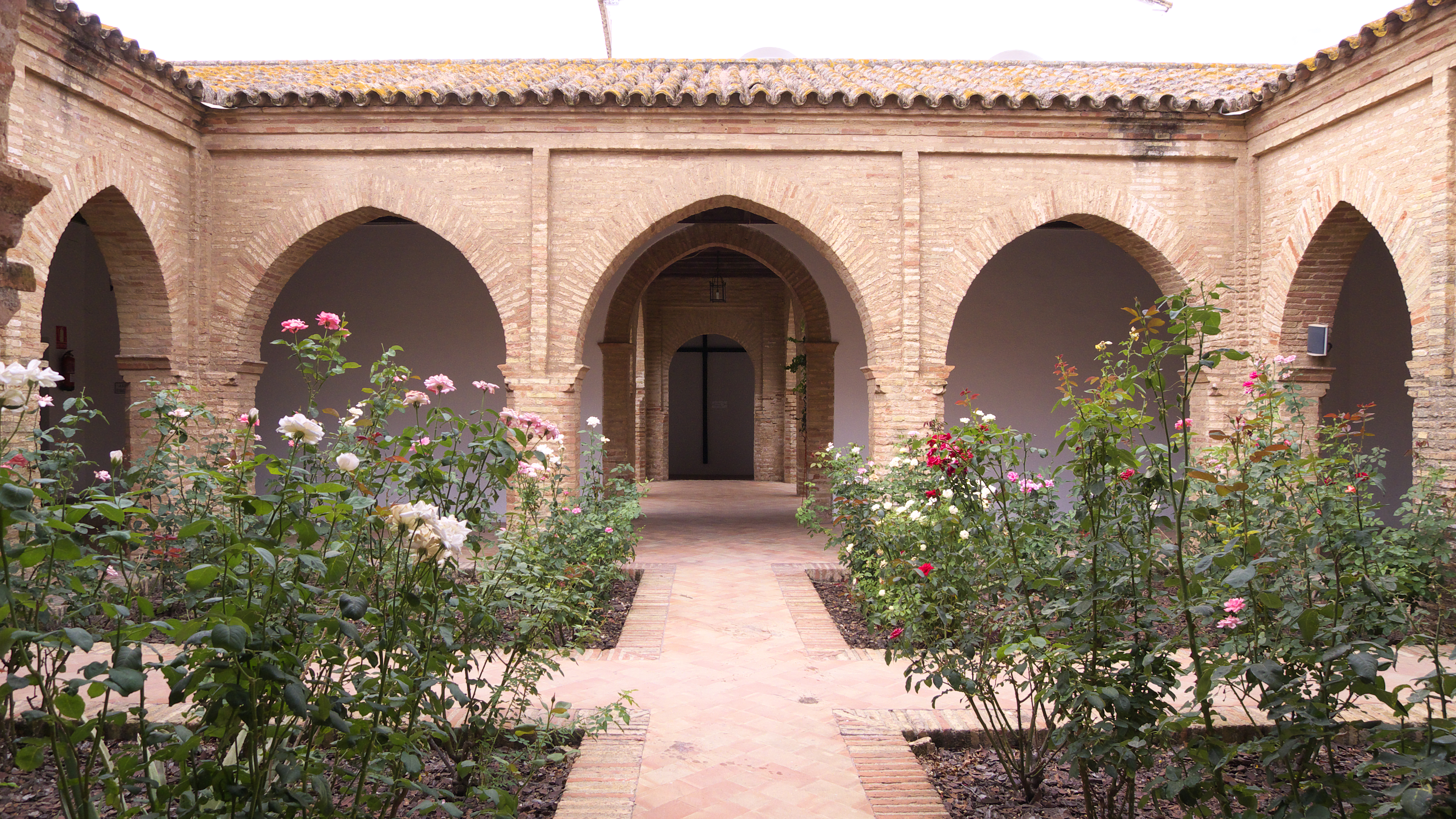 Claustro secundario del Monasterio de Santa Clara (s. XV)